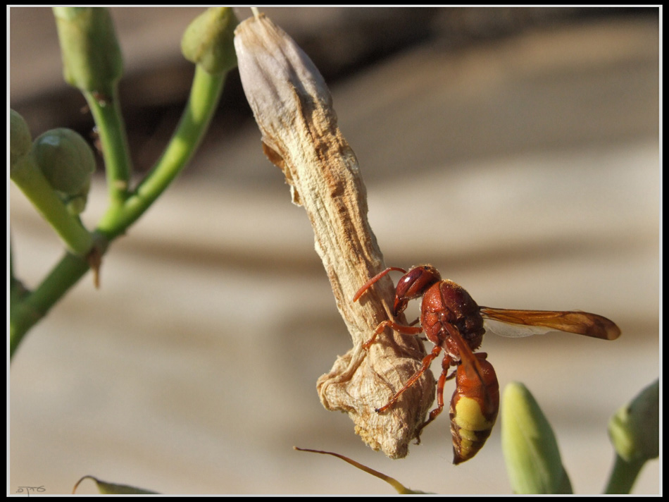 Rhynchium oculatum